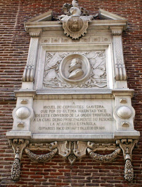 Placa esculpida dedicada a donde fue enterrado Miguel de Cervantes. Se encuentra en la fachada a la calle Lope de Vega del Monasterio de San Ildefonso y San Juan de la Mata, en Madrid.